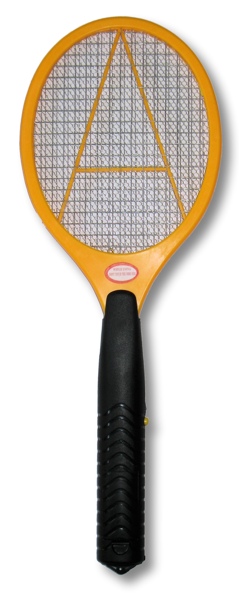 Elektronische Fliegenklatsche